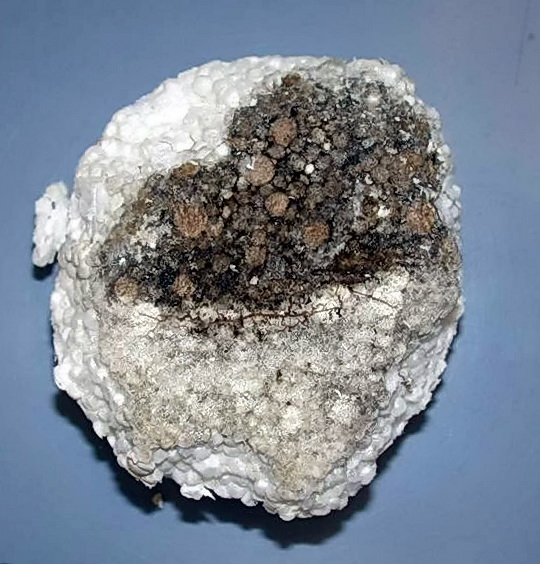 Коллония бактерий на EPS